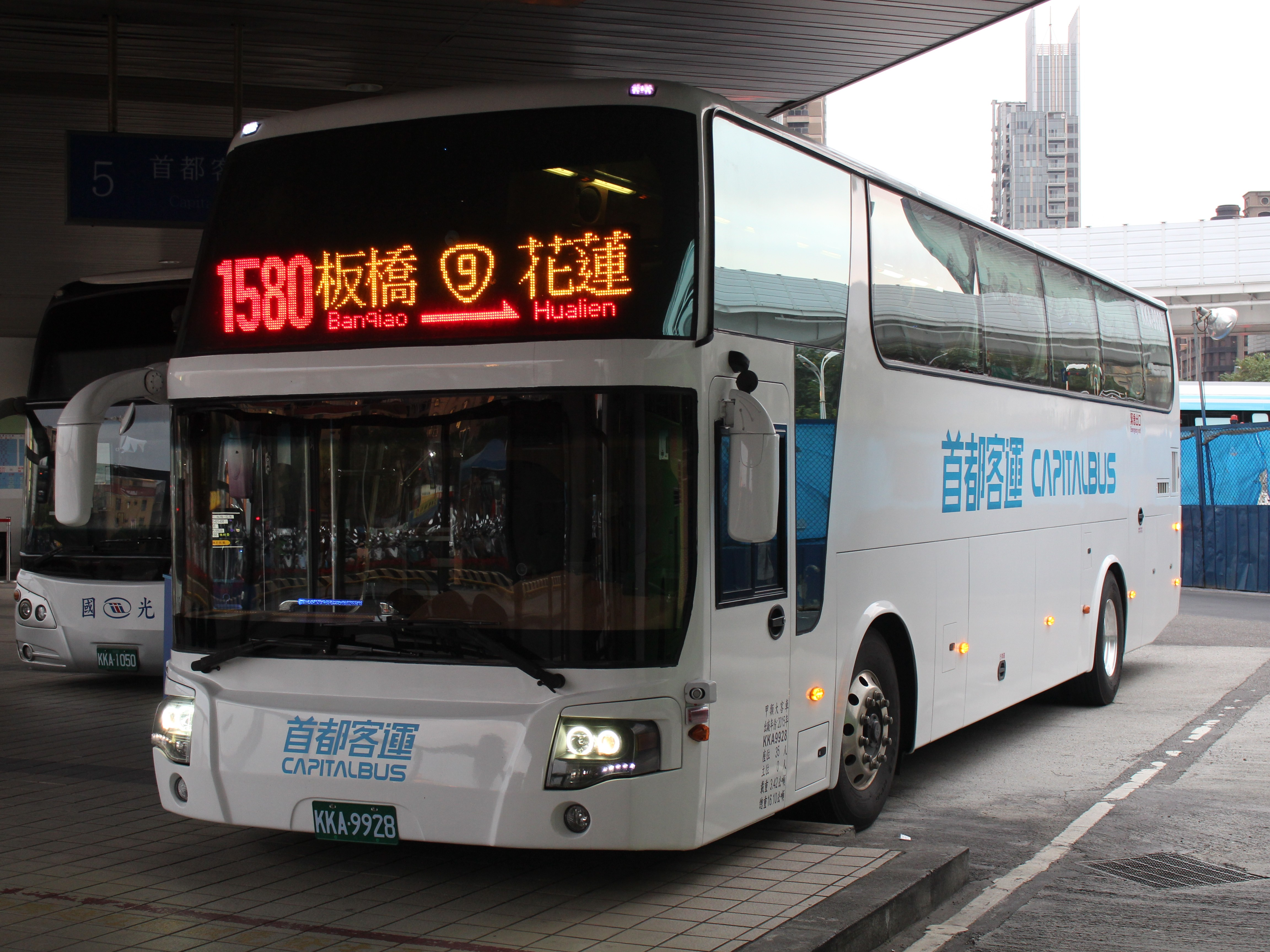 中文（台灣）: 首都通運2015年三菱扶桑RM11FN2XC大客車KKA-9928，原文境通運遊覽車285-W2，行駛1580線。